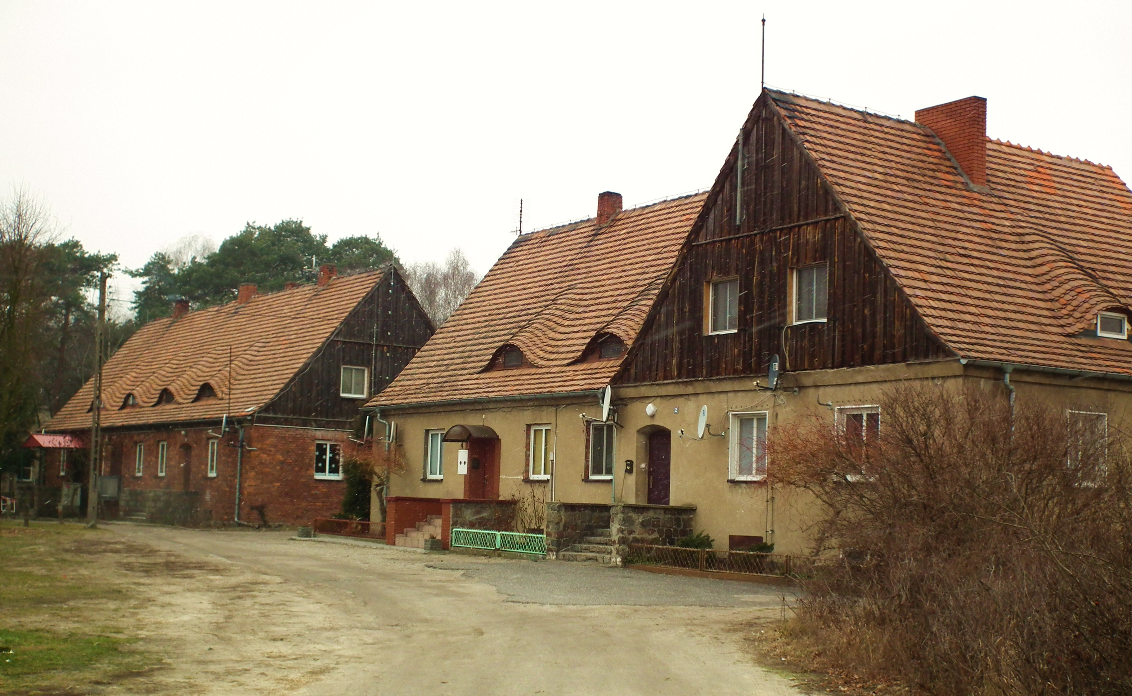 Krzykosy - wieś gminna. Centrum wsi.